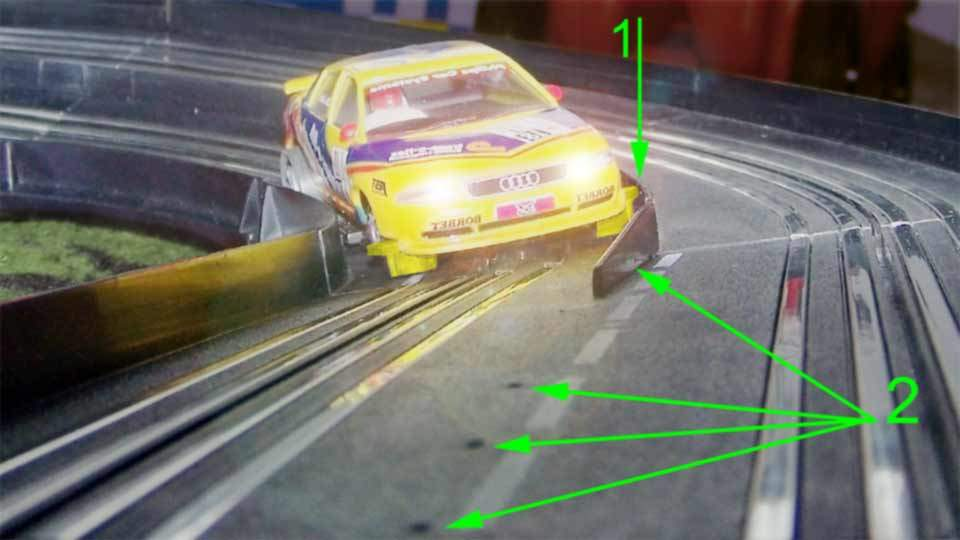 Carrera Servo Plus Spezifika: 1 Guide Horns (Abstandshalter), 2: Guard Rails (Richtungsweiser am Kurvenausgang)